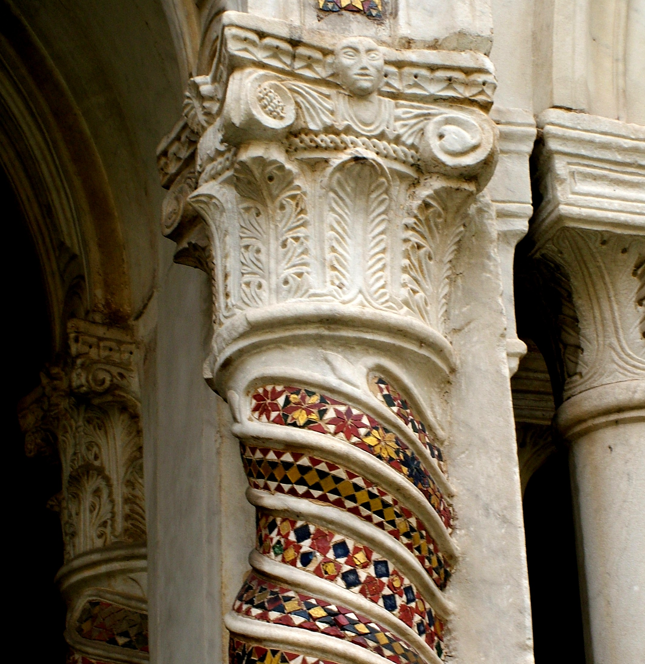 San Paolo fuori le mura (Róma, Olaszország): kolostorkerengő, mozaikdíszes oszlop